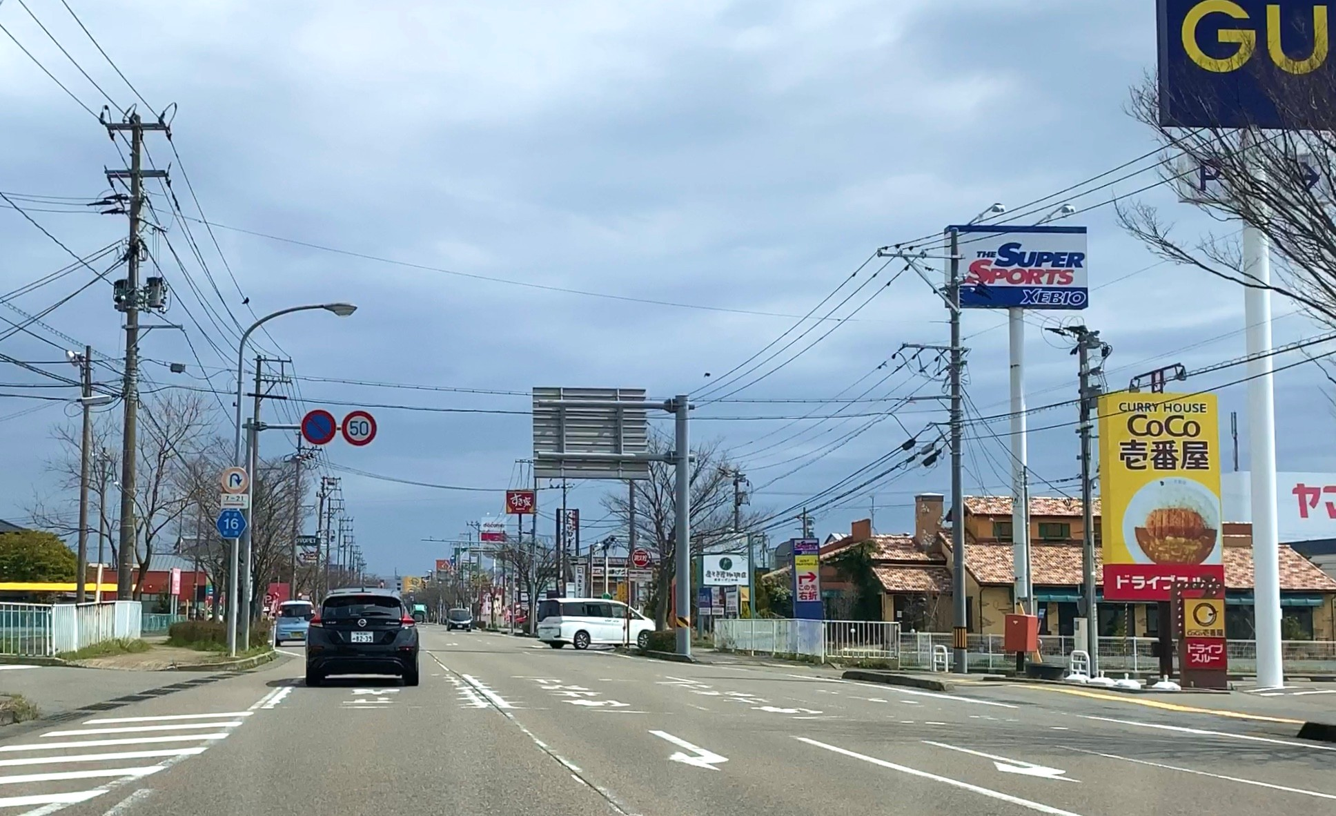 新潟県道16号新潟亀田内野線 亀田大通り（2020年4月）